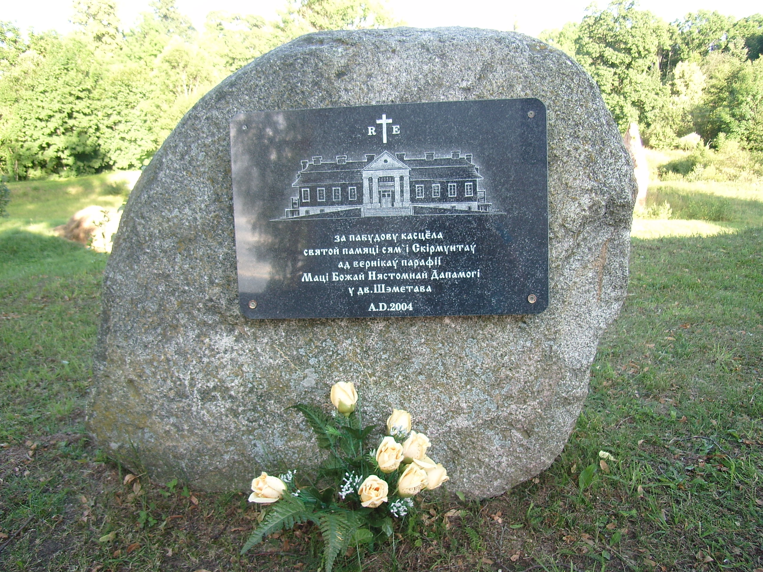 Беларуская (тарашкевіца): Былая сядзіба К. Сулістроўскага: фрагмэнты парку уязная алея сыстэма сажалак касьцёл, званіца, плябанія гаспадарчы двор руіны сьпіртзавода. в. Шэметава This is a photo of Belarusian heritage monument. Reference number: 613Г000464 ( WLM)